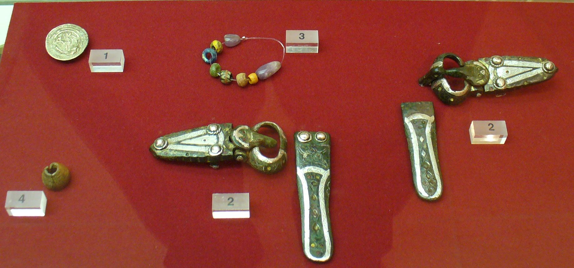 Lahr, Burgheimer Kirche, grave find